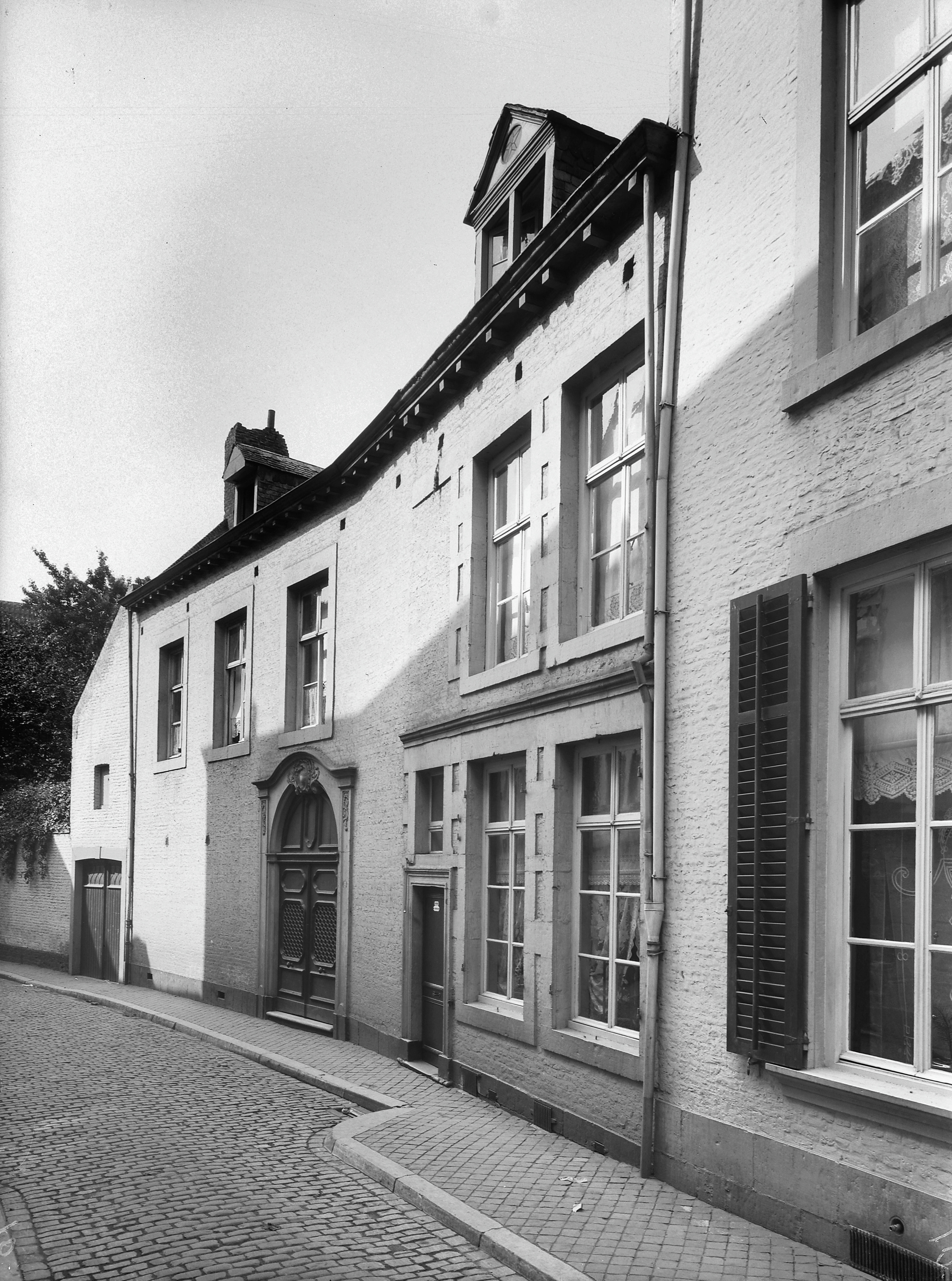 Kerken: Gevelwand met poort lutherse kerk